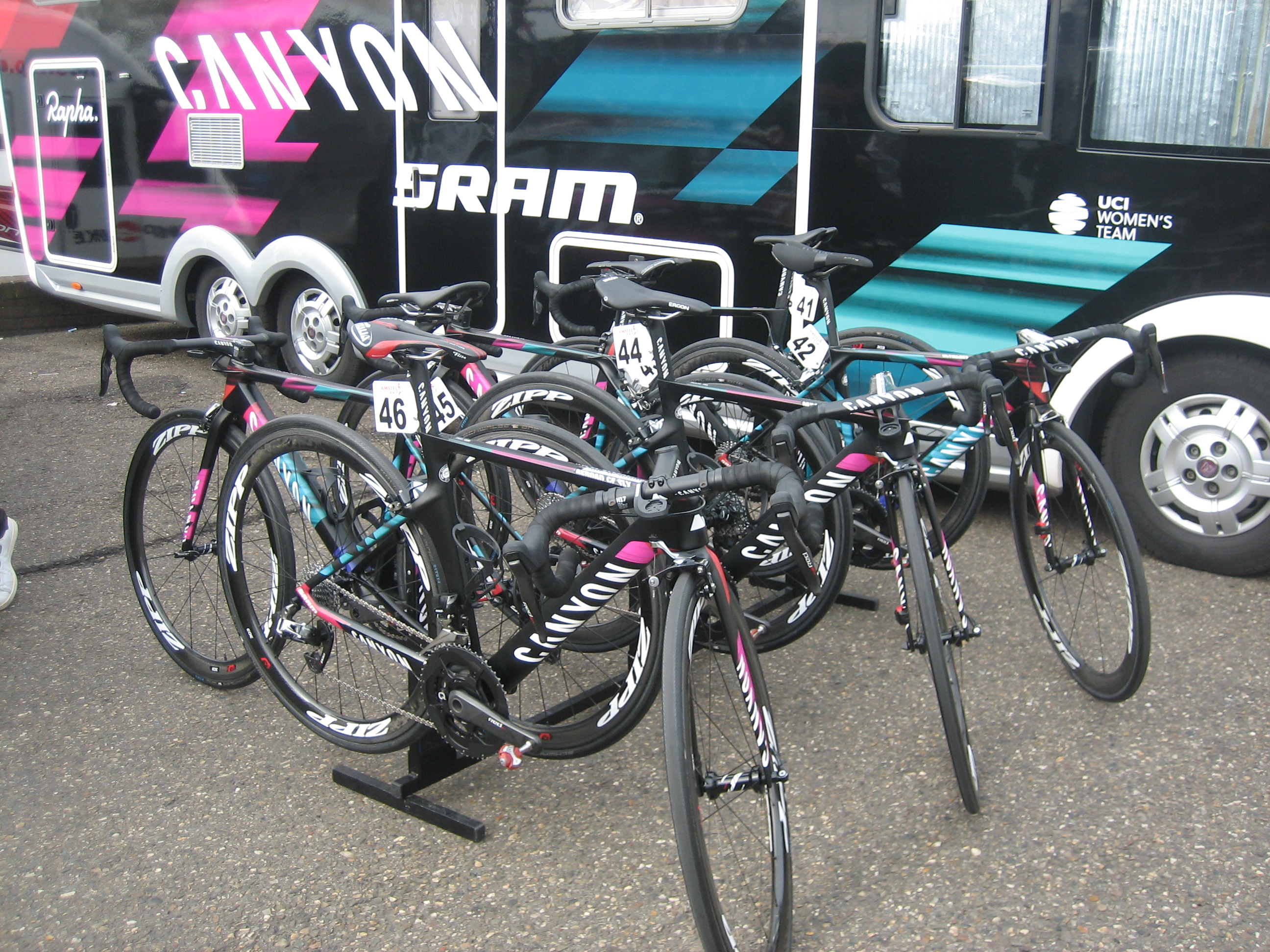 Start van de Amstel Gold Race Ladies Edition 2017 in Maastricht.